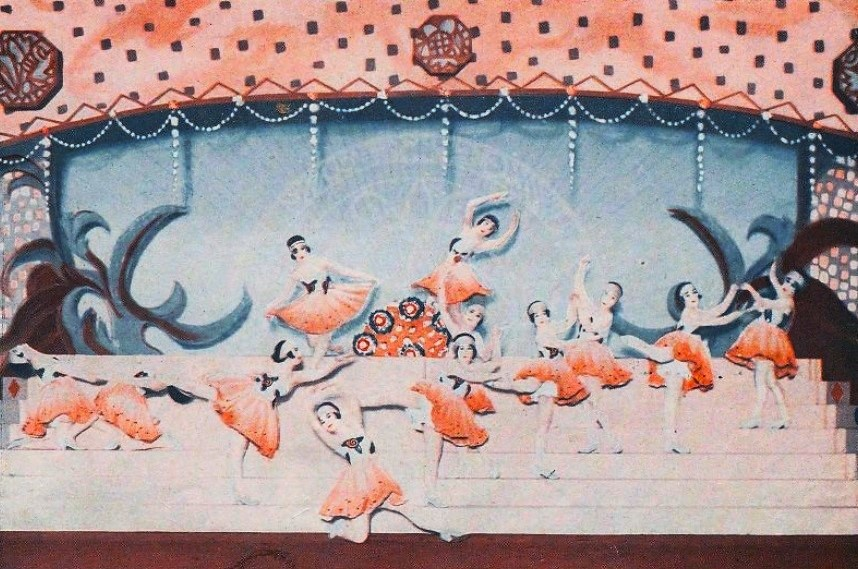 松竹座レビュー